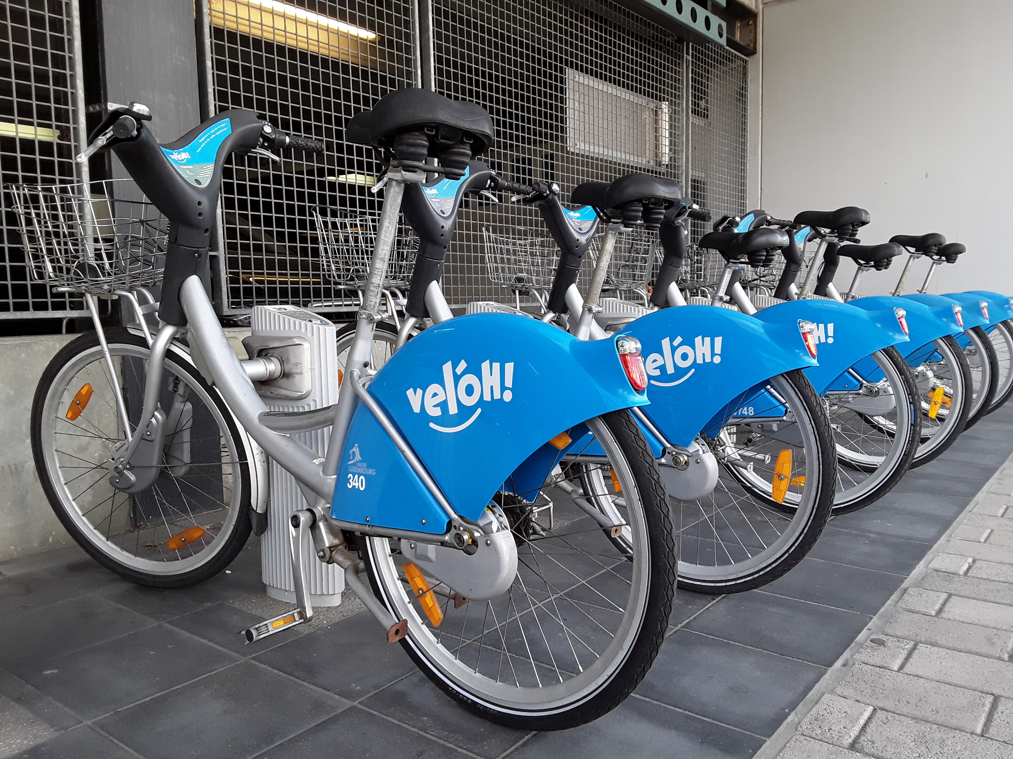 Arceau à vélo au P+R Bouillon à Luxembourg-Ville